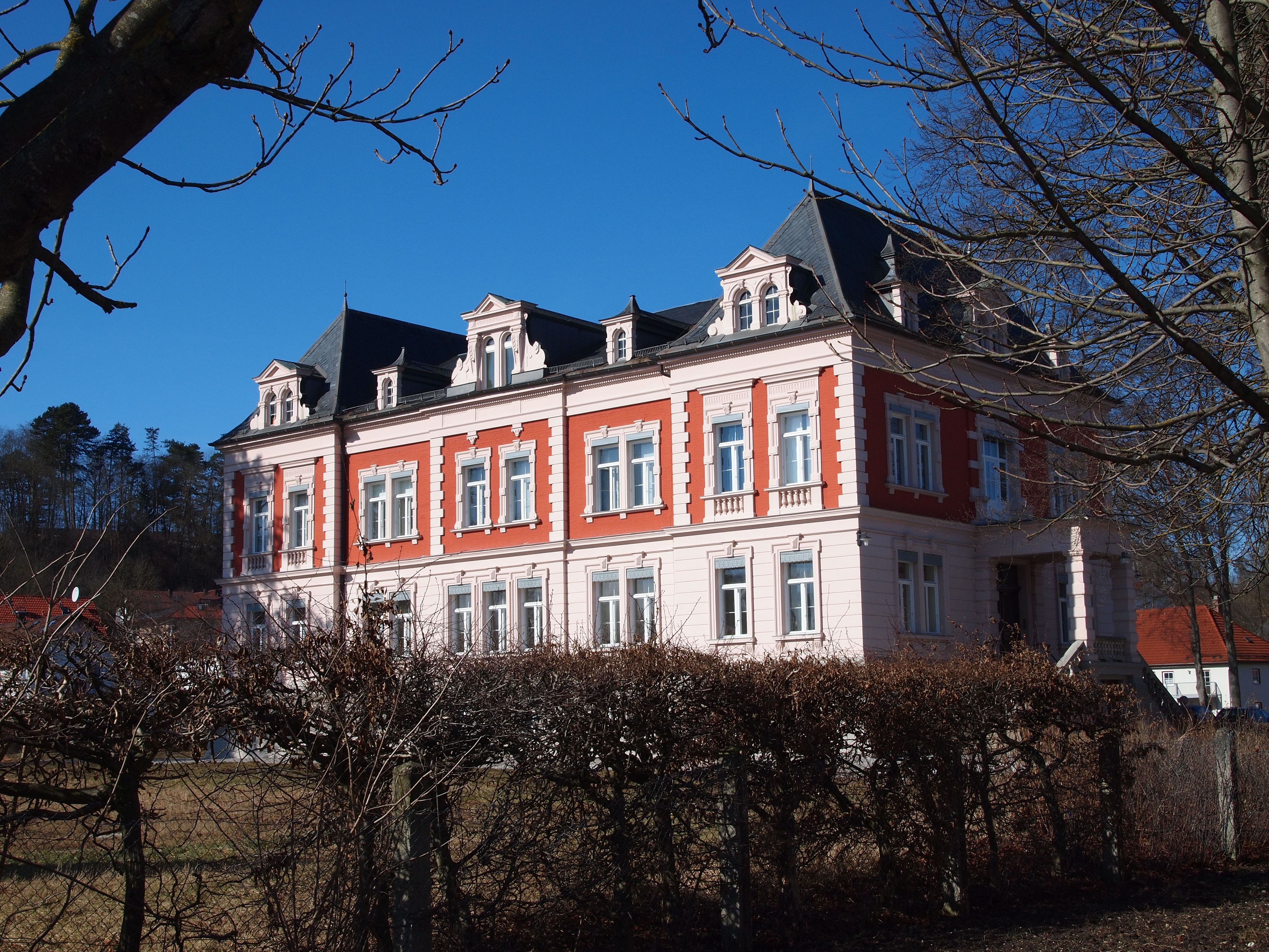 Mechanische Baumwollspinnerei Kaufbeuren Direktorenvilla